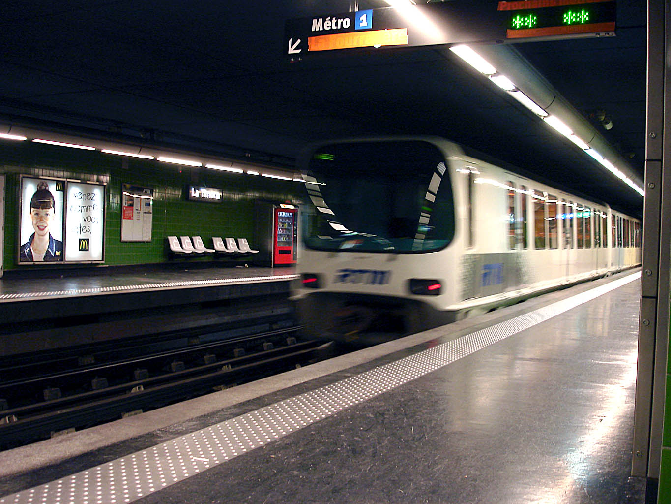 Station La Timone du métro de Marseille, France.